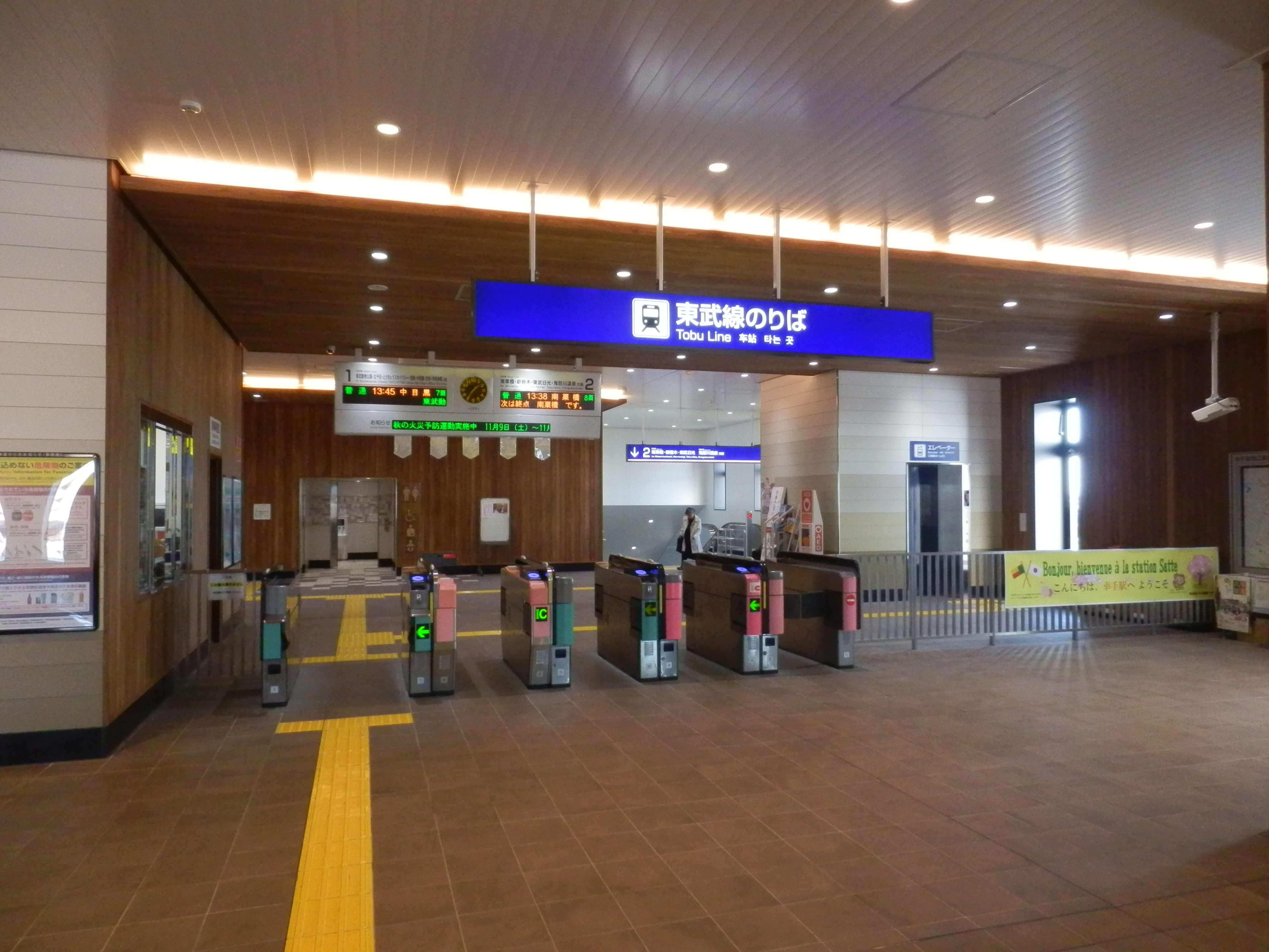 幸手駅改札